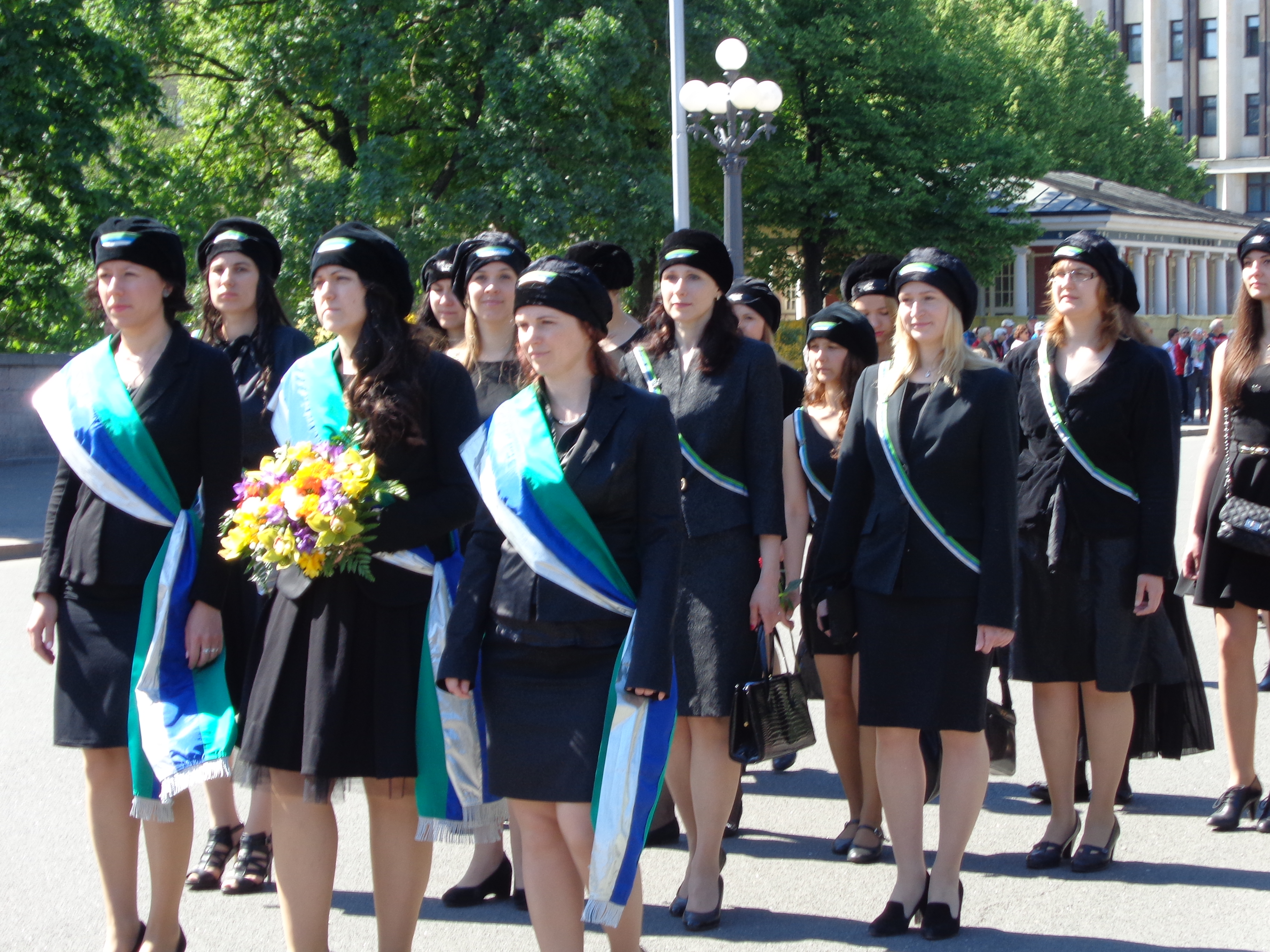 Zug der Damenverbindung Gundega im Studentinnen-Präsidenkonvent zum Freiheitsdenkmal in Riga